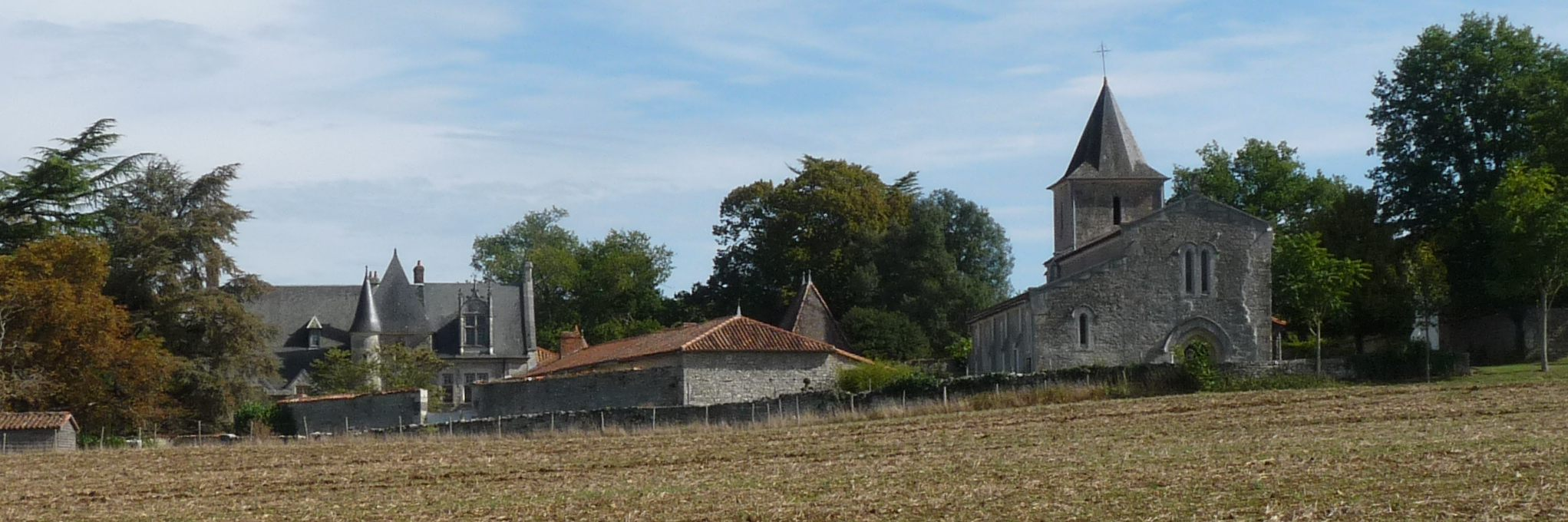 vue de l'église et du manoir d'Aizecq, Charente, France